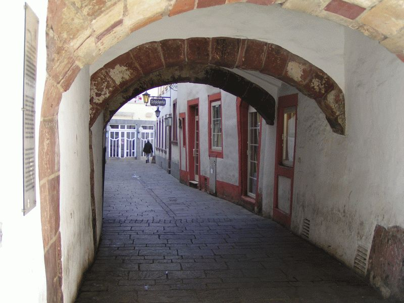 Trier Judengasse und Judenpforte